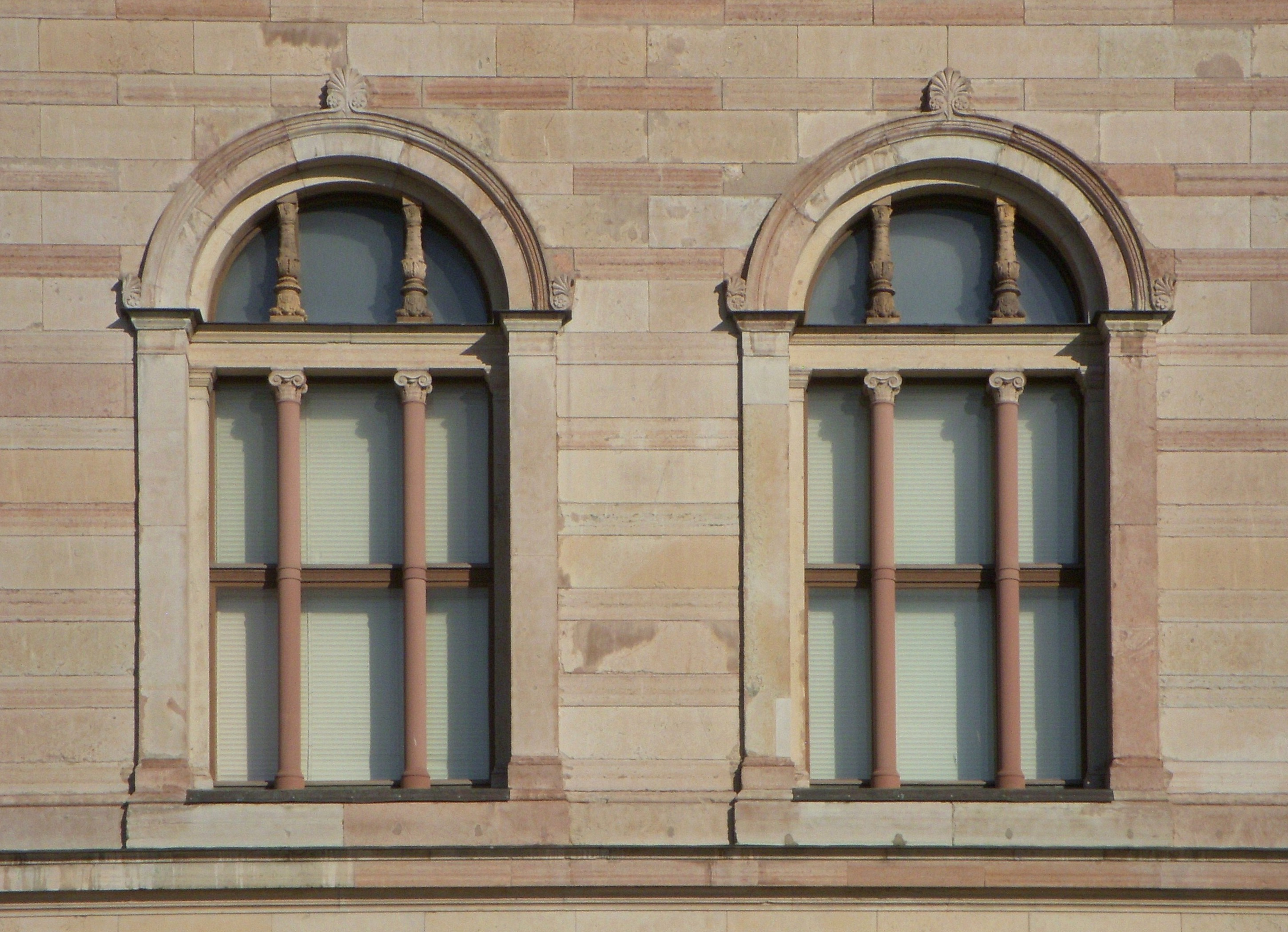 Nationalmuseum i Stockholm, fönster, huvudfasad